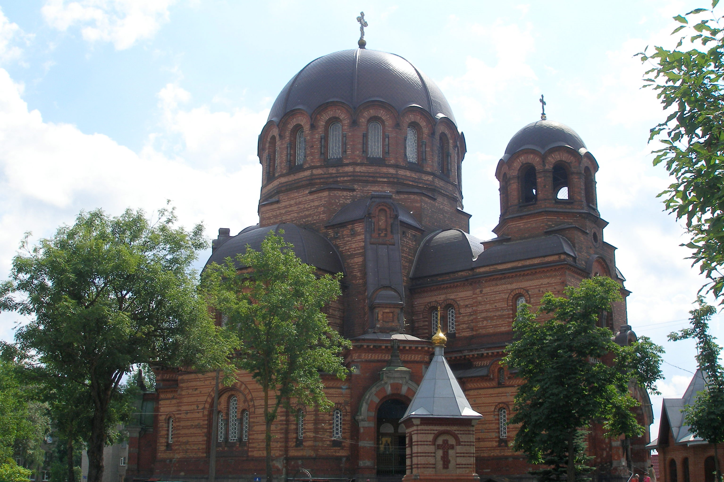 Narva õigeusu kirik